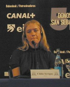 Chloë Sevigny pour la promotion de Melinda et Melinda